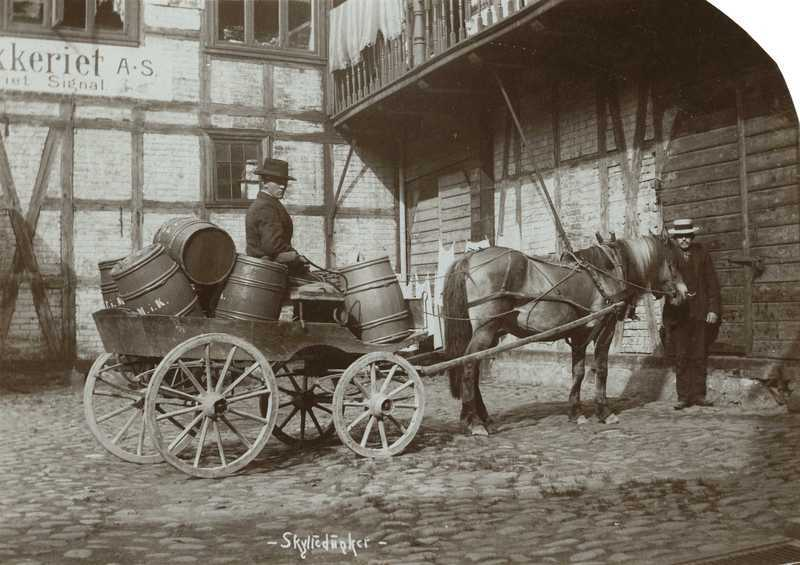 Skylledunker, gårdsinteriør, bindingsverk, hest, vogn. Oscar Hvalbye (1864-1938) tok teologisk embetseksamen 25 år gammel. Han arbeidet for bymisjonen (Kristiania Indremisjon) og var prest i Sagene menighet. Som ivrig amatørfotograf samarbeidet han med sin gode venn Anders B. Wilse. Han var virksom i Oslo i perioden ca 1890-1920. Hans fotosamling ble i 1986 gitt til Oslo Bymuseum.